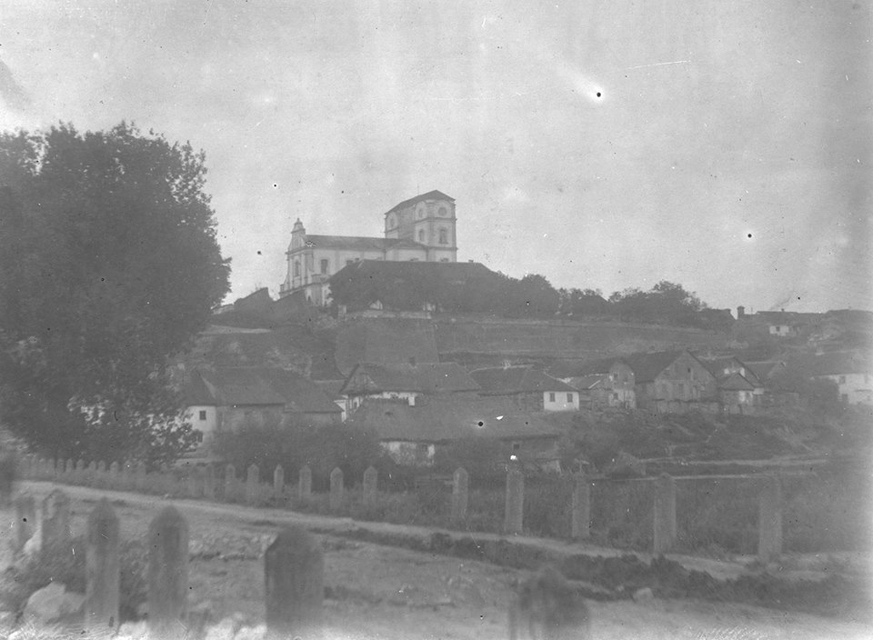 Костел у Вишнівці